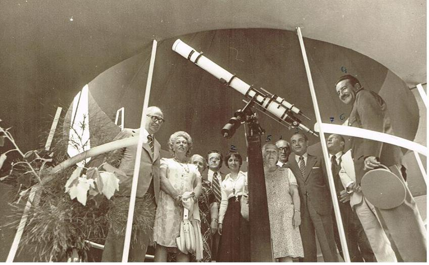 1: Ing. Agrim. Osvaldo Cock, profesor de Astronomía del IBO 2: Ing.Agrim. Lilián Pérez, quien colaboraba en el Obs. del IAVA 3: Sr Walter Barbosa, secretario del Cnel. Gabriel Borba, del Comité Nacional de Astronomía (MEC). 4: Cnel. Pastorino, que era profesor efectivo de Secundaria 5: Sra. Margarita Mendoza, funcionaria del IBO 6: Prof. Carlos Etchecopar, Director del Observatorio Montevideo (ubicado en el IAVA). 7: Cap. de Navío Julio Ambrosini, Inspector de Astronomía del Conejo de Educación Secundaria 8: Prof. Sara Satanoff , Inspectora de Química del Consejo de Educación Secundaria